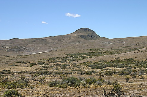 Cerro Wenceslao, basalto olivinico perteneciente a la formación Cerro del Doce